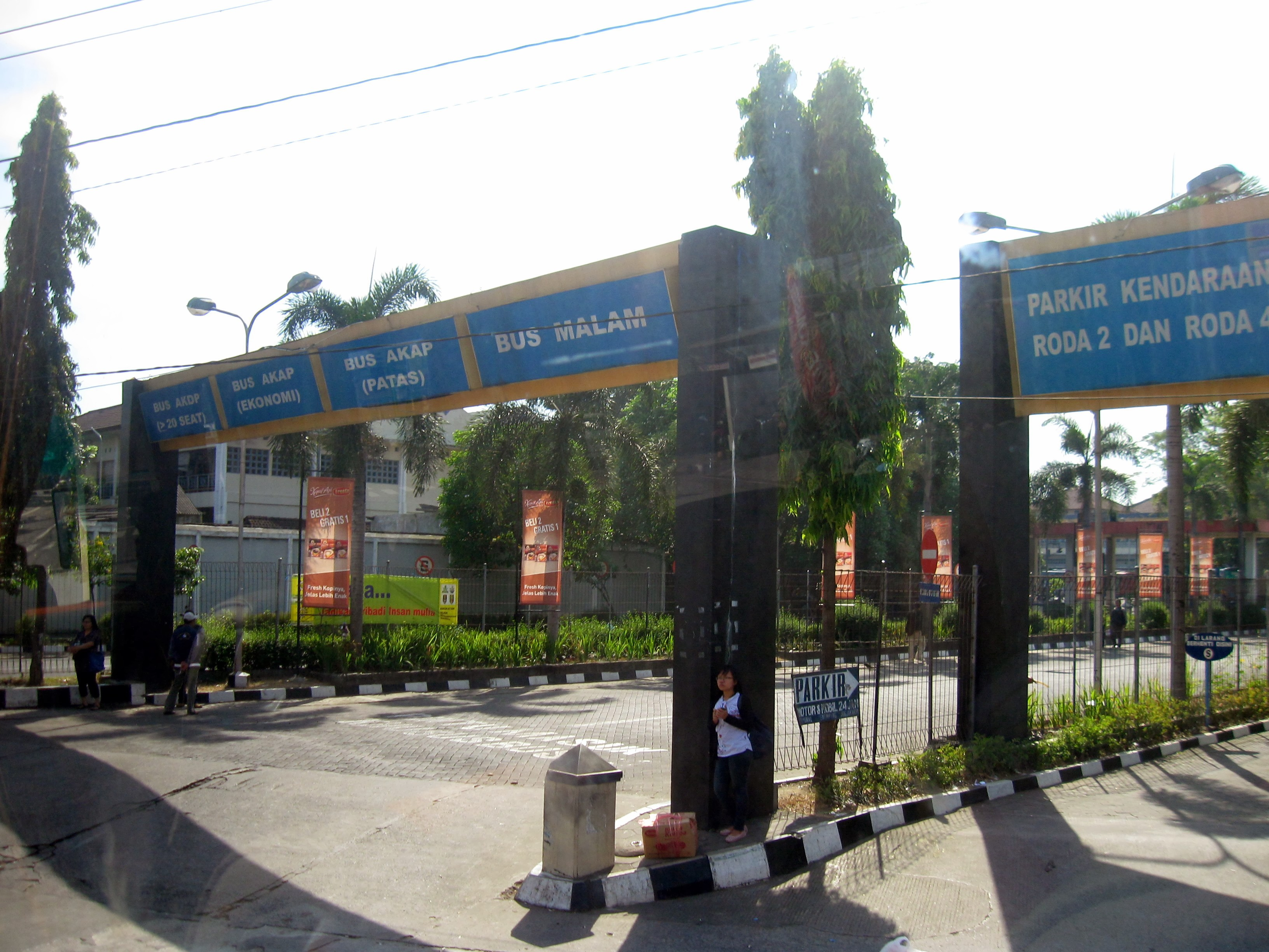 Terminal Giwangan, Yogyakarta